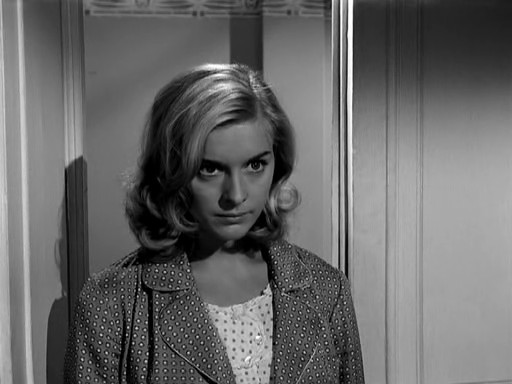 Screenshot del film Estate violenta (1959) di Valerio Zurlini.